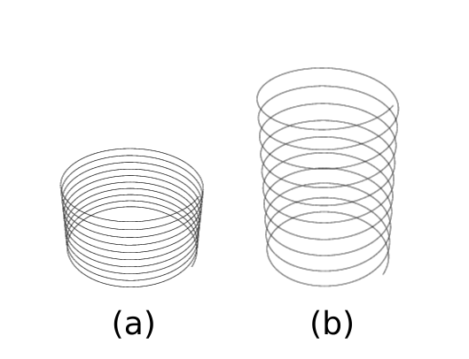 עקומי הליקס.